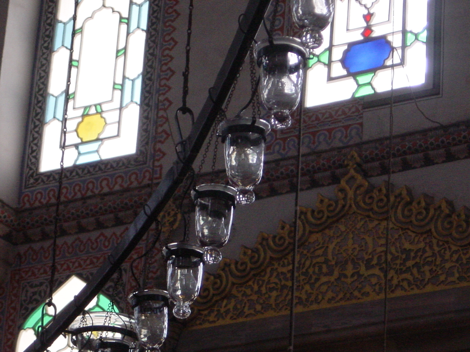 Lampade e vetrate della Moschea detta Sehzade camii ad Istanbul. Foto di: Giovanni Dall'Orto, 29-5-2006.